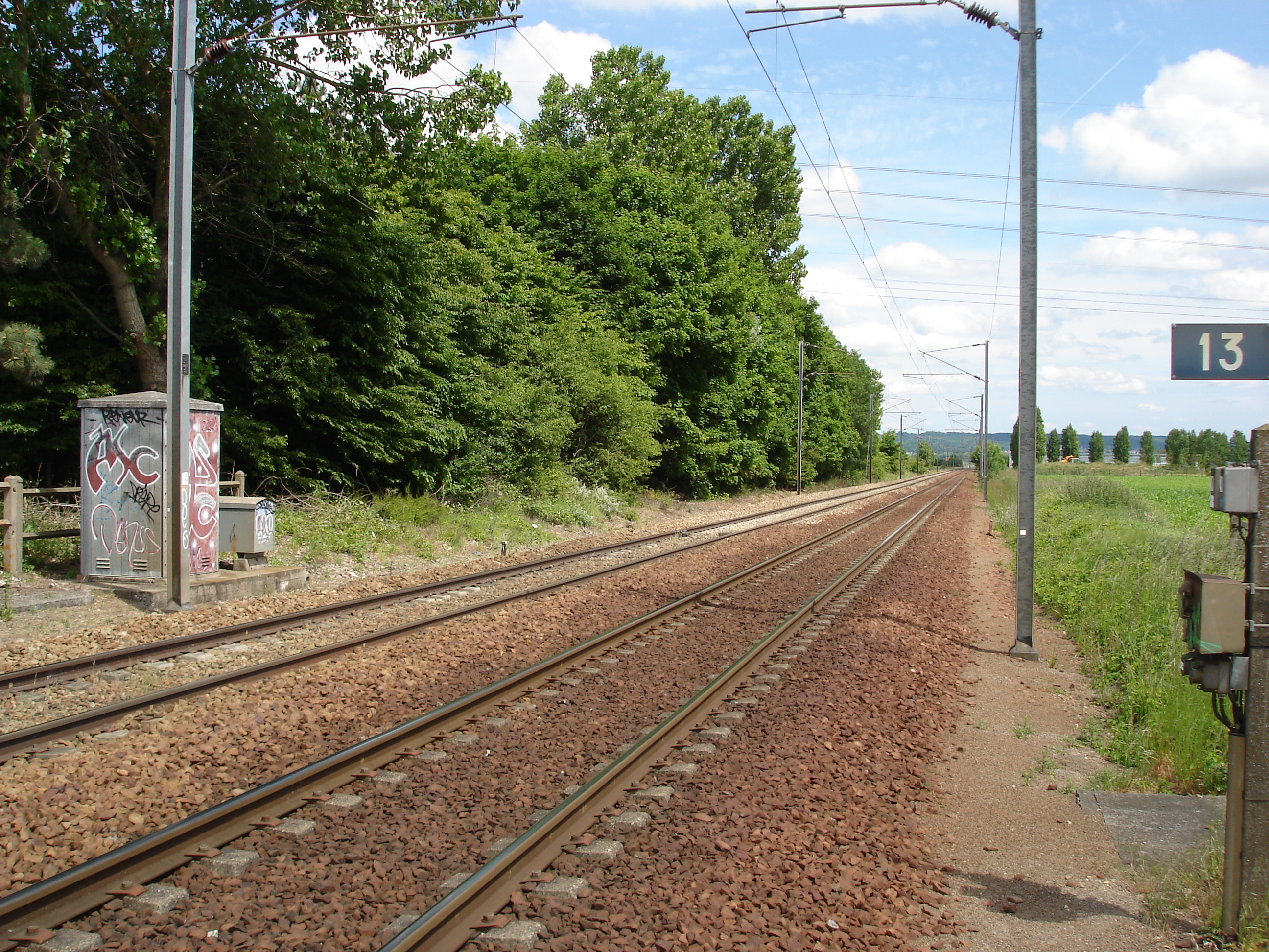 La ligne de Saint-Cyr à Surdon (vue en direction de Saint-Cyr), au passage à niveau n° 13, à Méré (78).